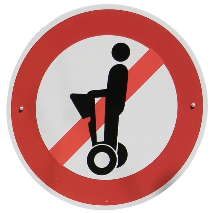 Durchfahrtverbots-Schild für Segways auf einem Gehweg.